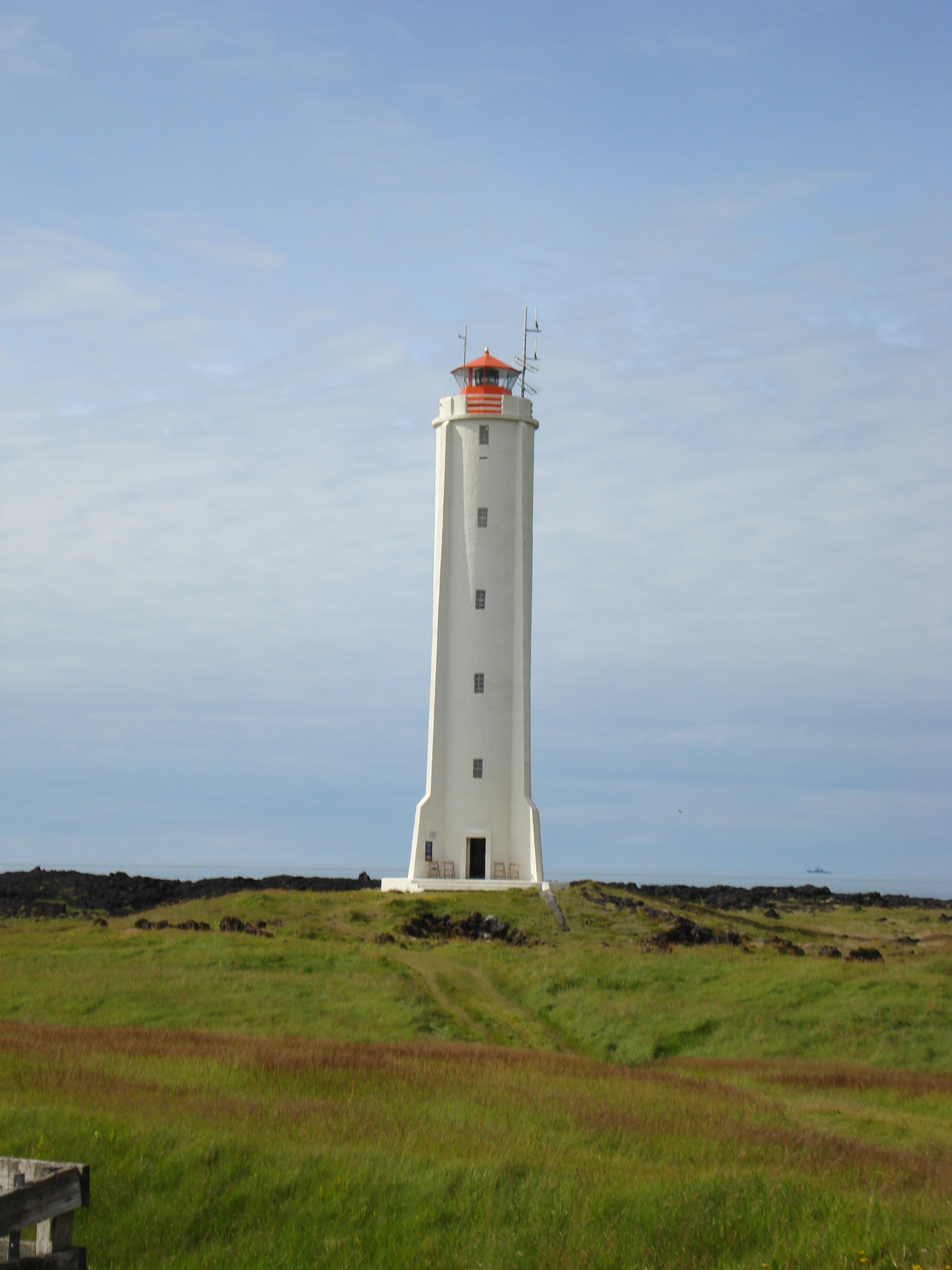 Lighthouse Malarrif, Snæfellsnes, Iceland: Byggingarár 1949, Ljóseinkenni 4 á 30 sek., Ljóshæð 30 m. Vitahús 24 m.